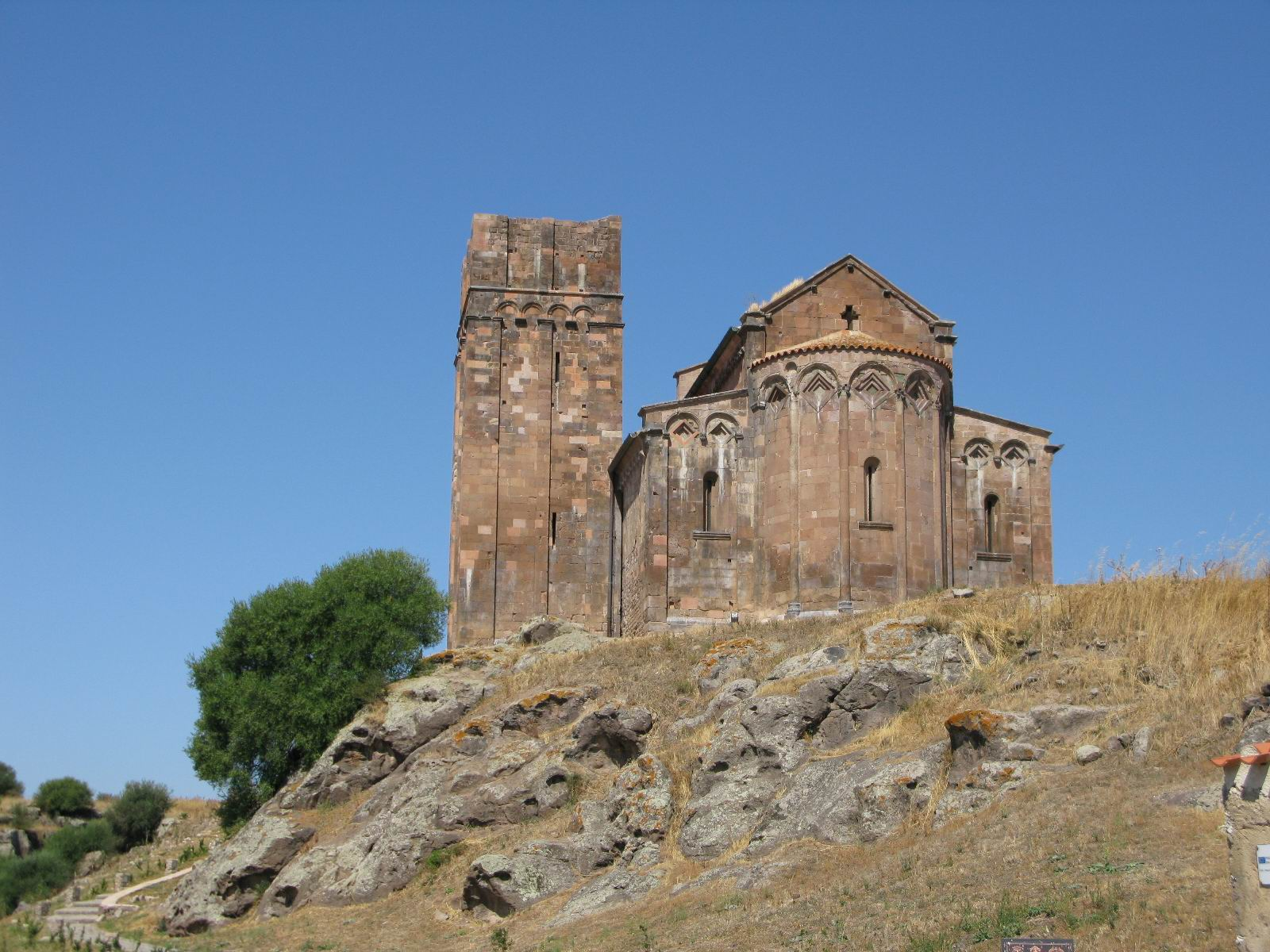 La basilica romanica di S. Antioco di Bisarcio (SS)